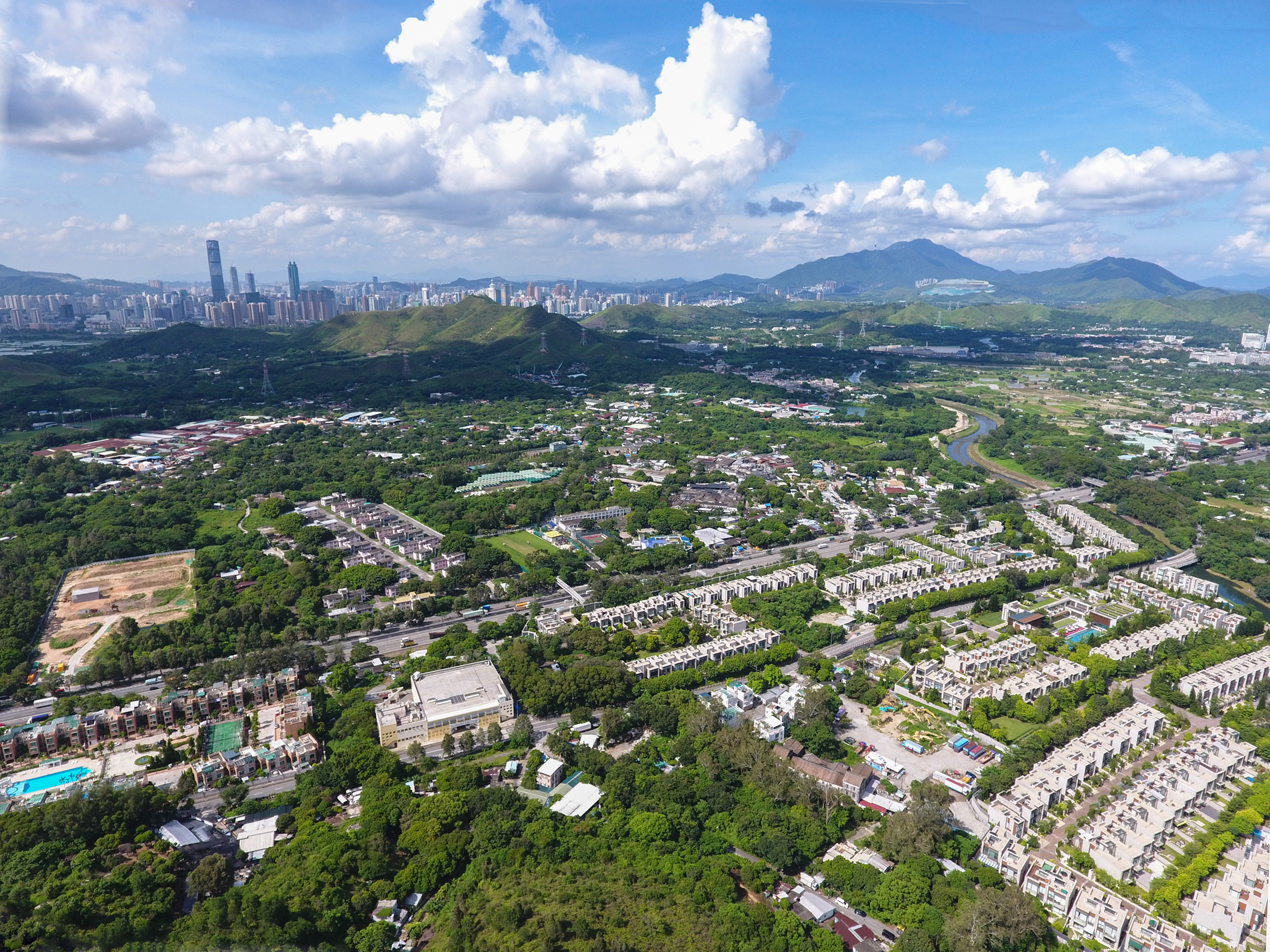 Kwu Tung